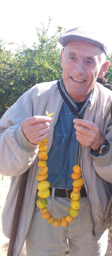 תמונה